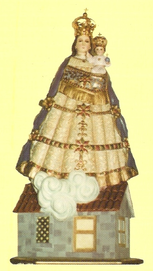 Imagen venerada en Pesquería, Nuevo León, México; de Nuestra Señora de Loreto